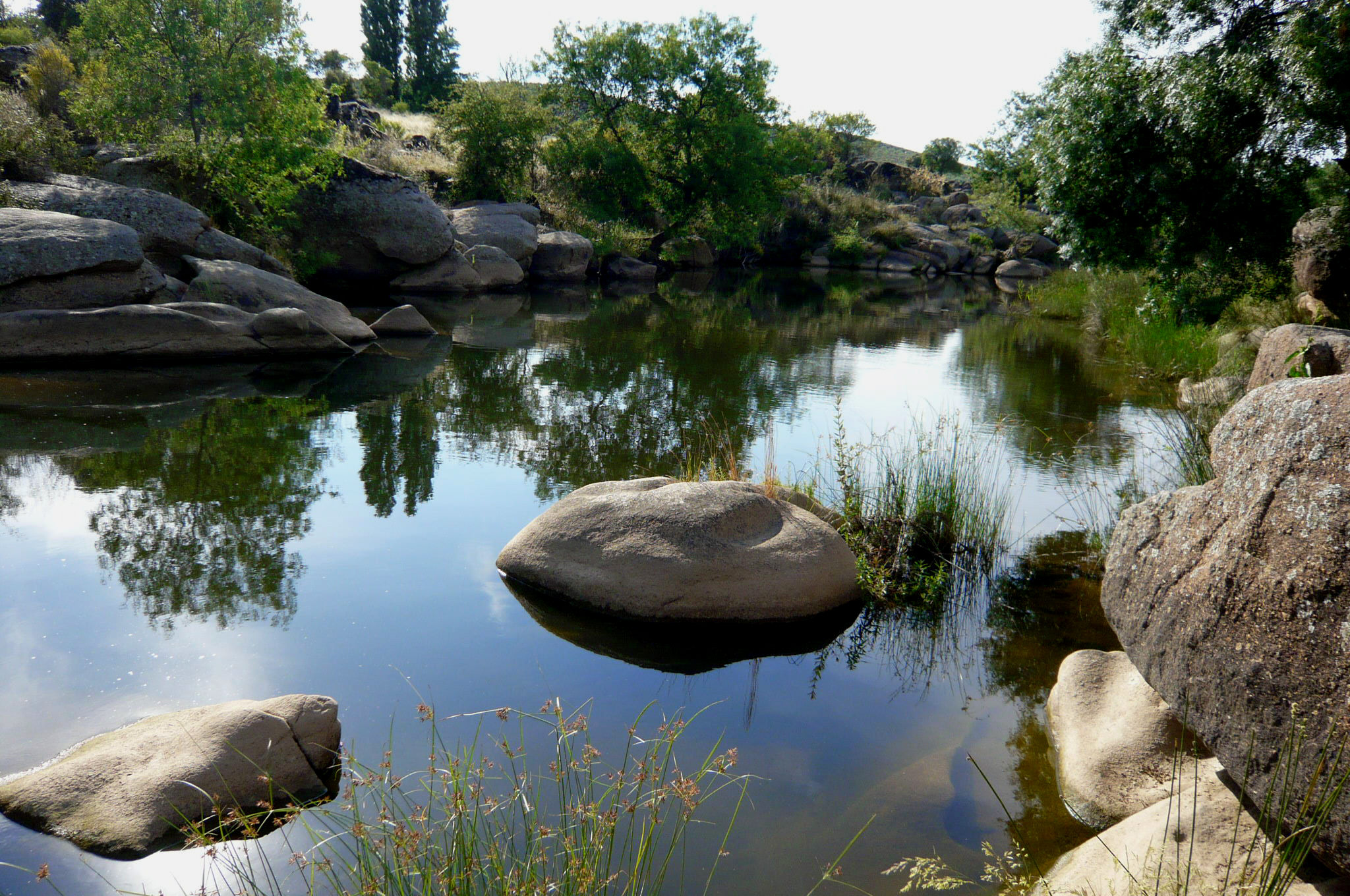 Una "tabla" en el Río Pusa, tramo superior: Santa Ana de Pusa (Toledo, Castilla-La Mancha, España)